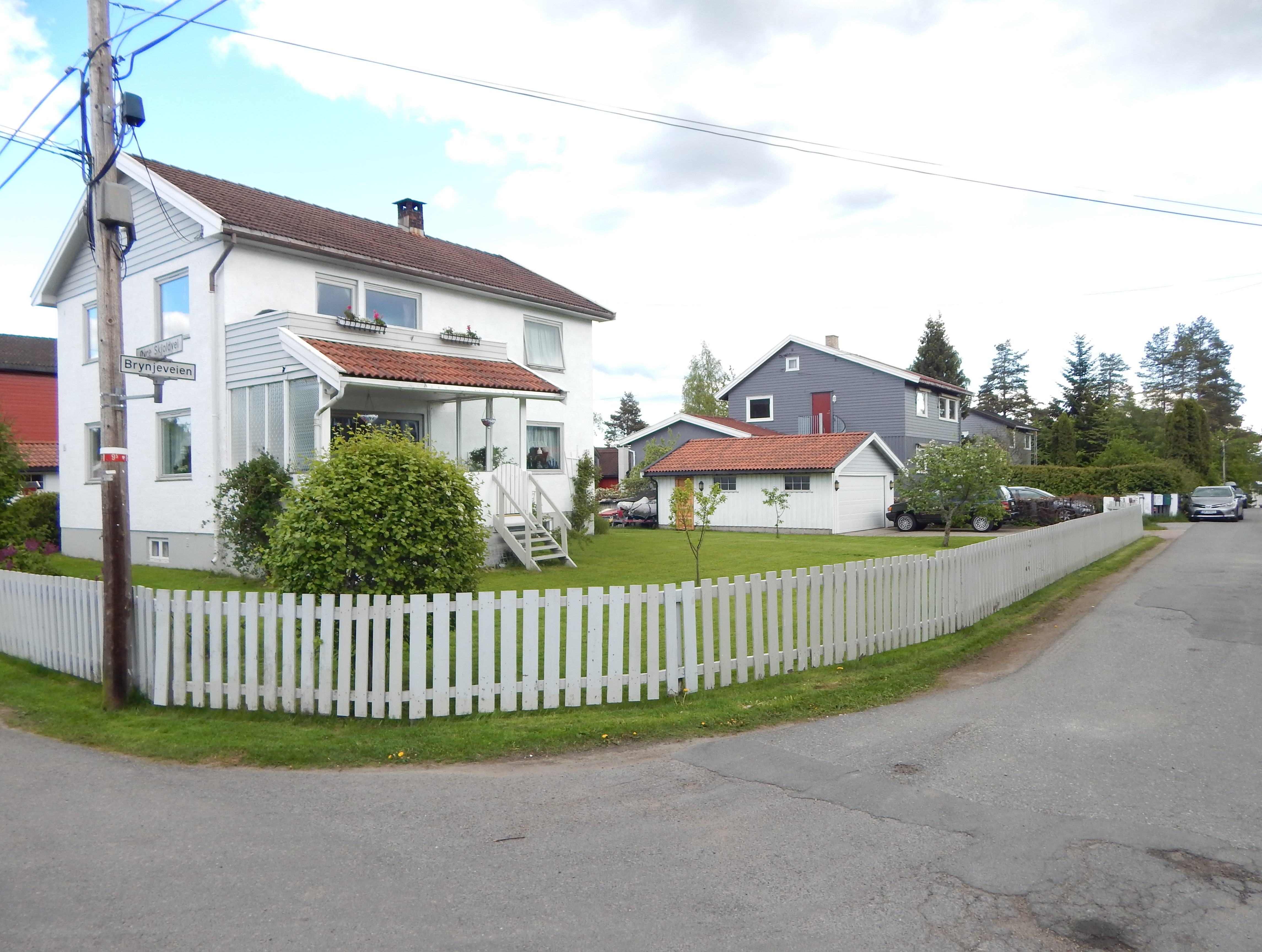 Brynjeveien ved Øvre Skjoldvei